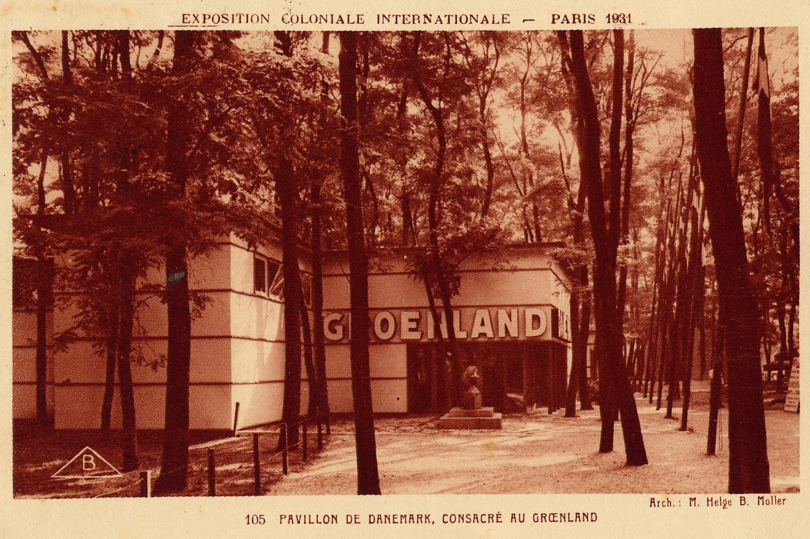 Pavillon du Danemark à l'Exposition Coloniale de PARIS en 1931